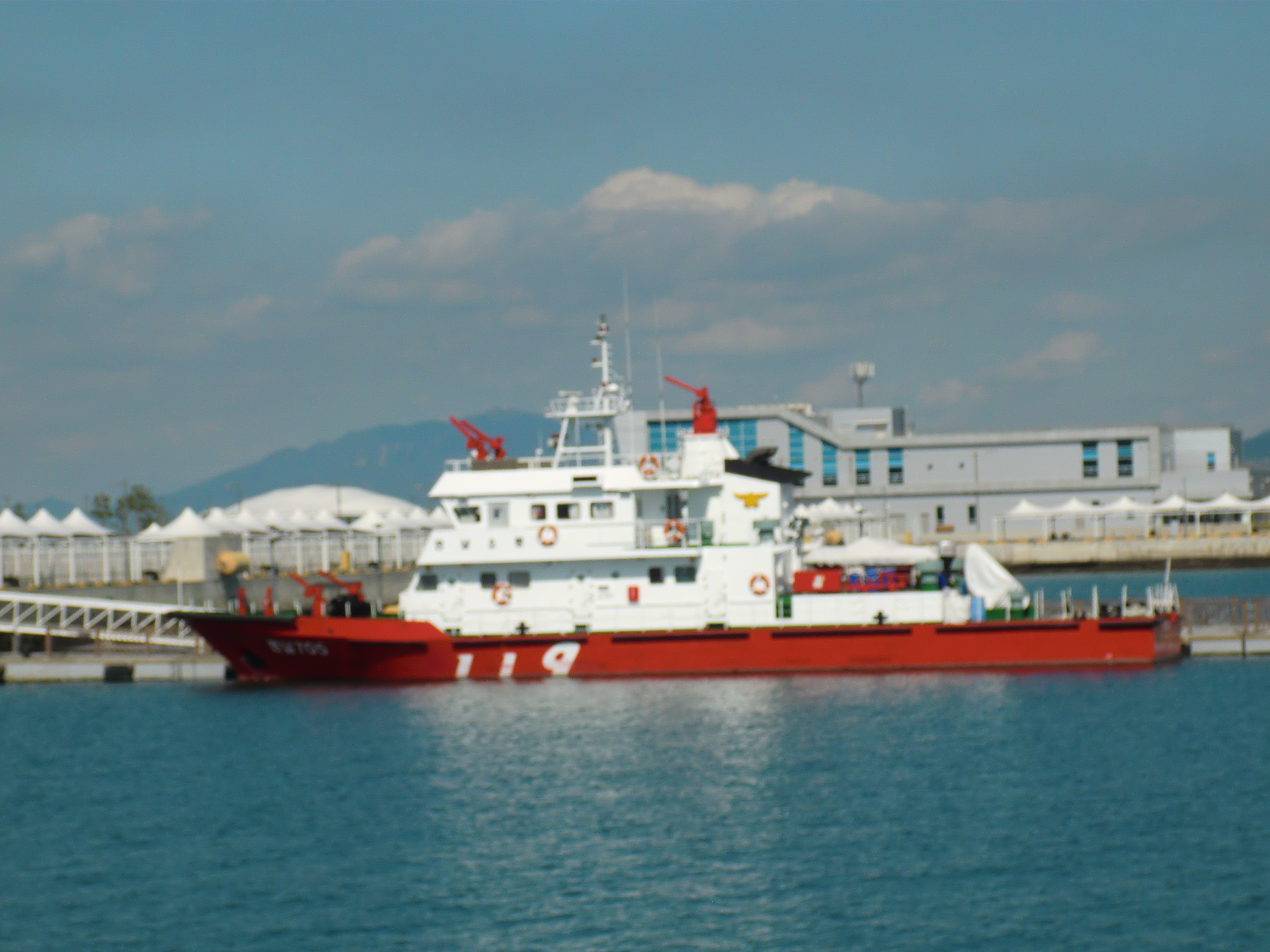 여수소방서 소방초정